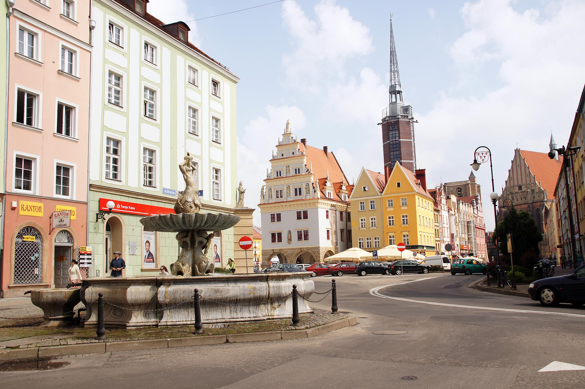 Nysa, Stare Miasto